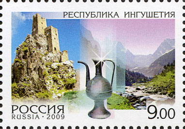 Марка Почты России «Республика Ингушетия», выпушена в 2009 году в серии «Регионы»